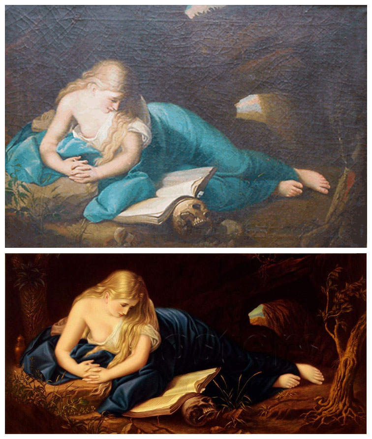 Oben: Büßende Magdalena von Pompeo Batoni (1760), unten: chromolithografische Reproduktion für den Vertrieb als so genannter Öldruck (Ende 19. Jh.)